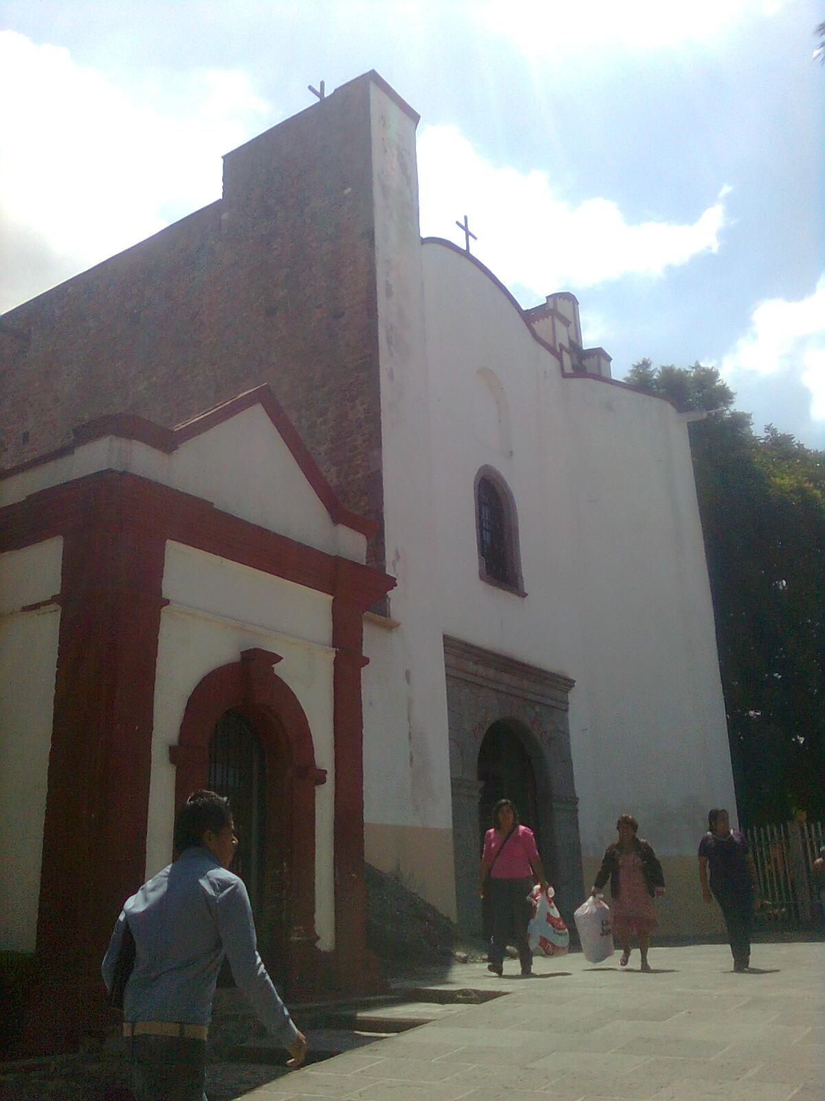 Templo importante de Chiautempan, debido a que fue la cabecera parroquial del mismo desde 1560; en este lugar llegó la Imagen de Jesús del Convento hacia 1566, desde donde es venerado hasta la fecha.